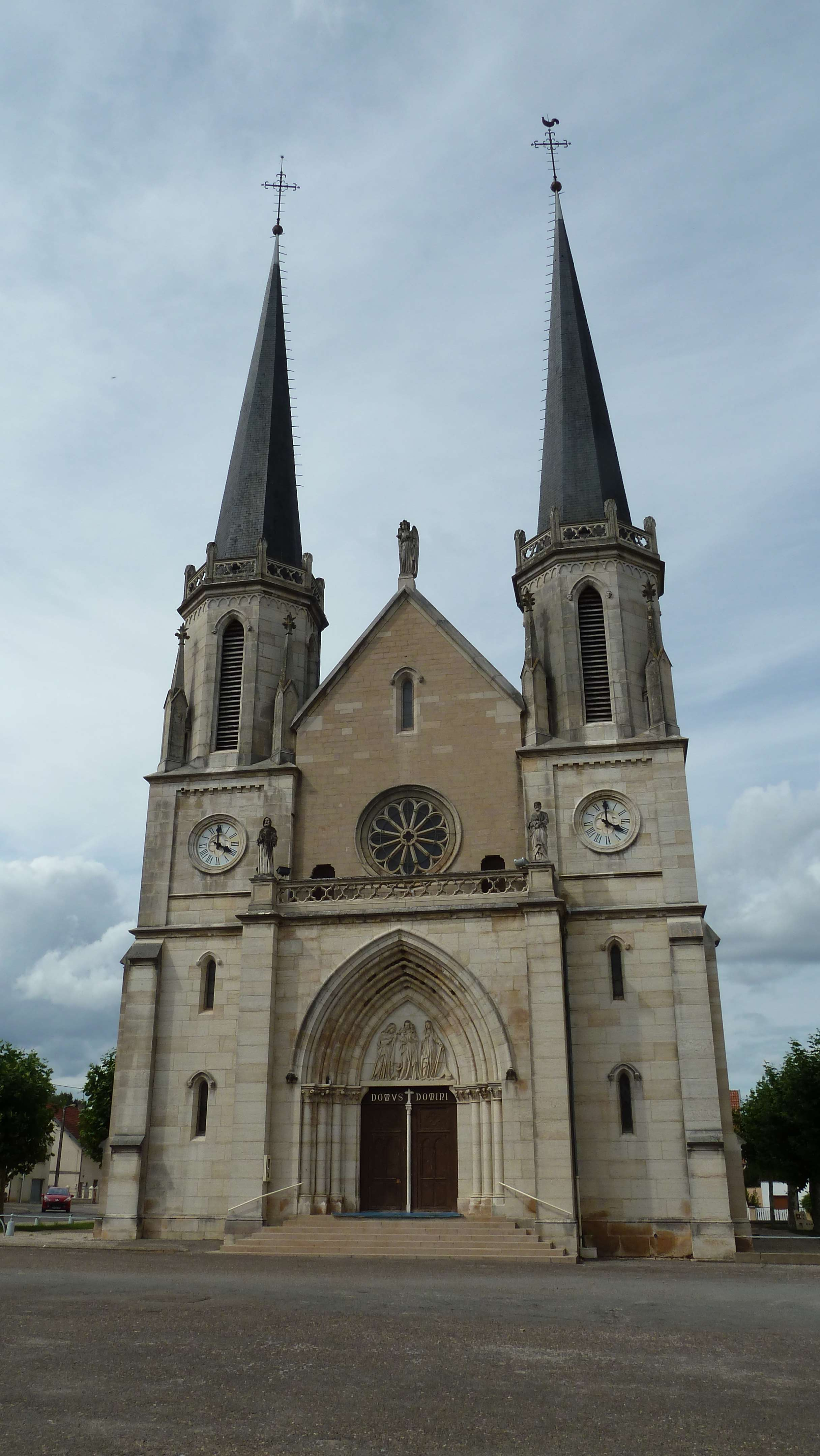 Eglise de Lamarche sur Saône.